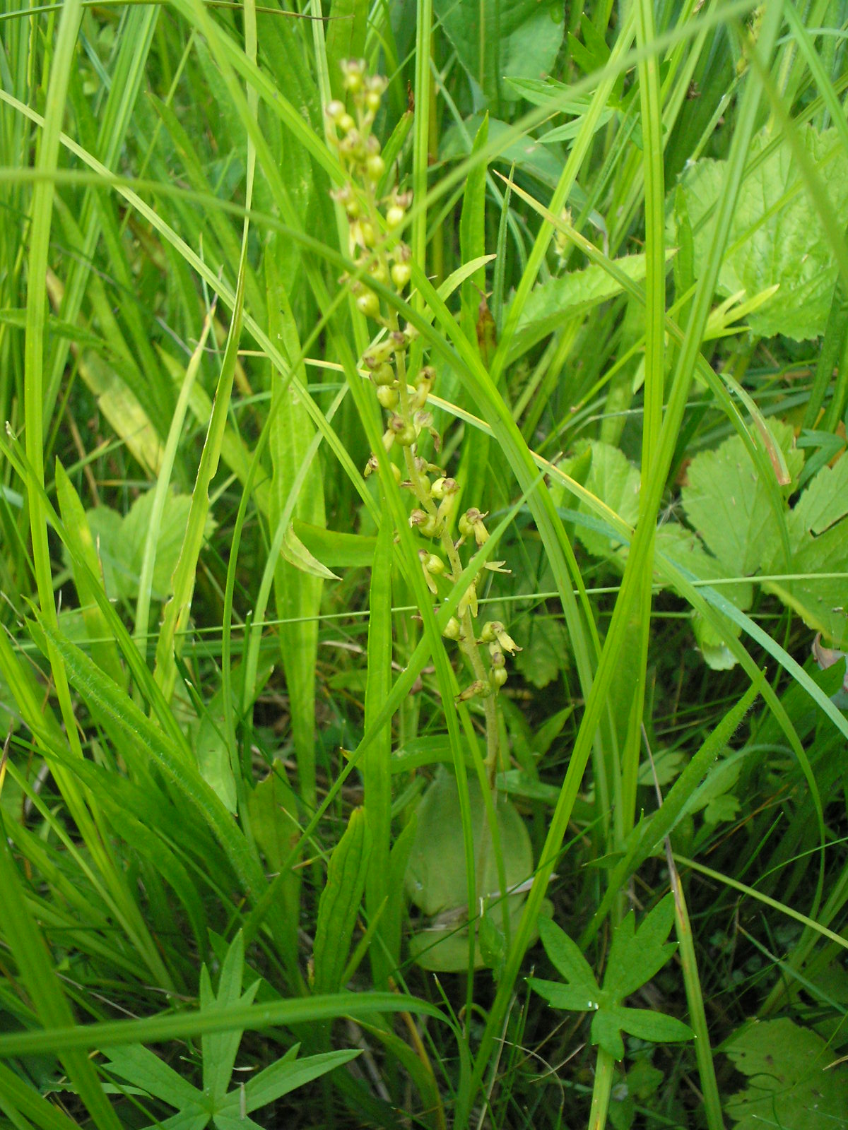 Зозулині сльози яйцеподібні, Буго-Деснянський заказник